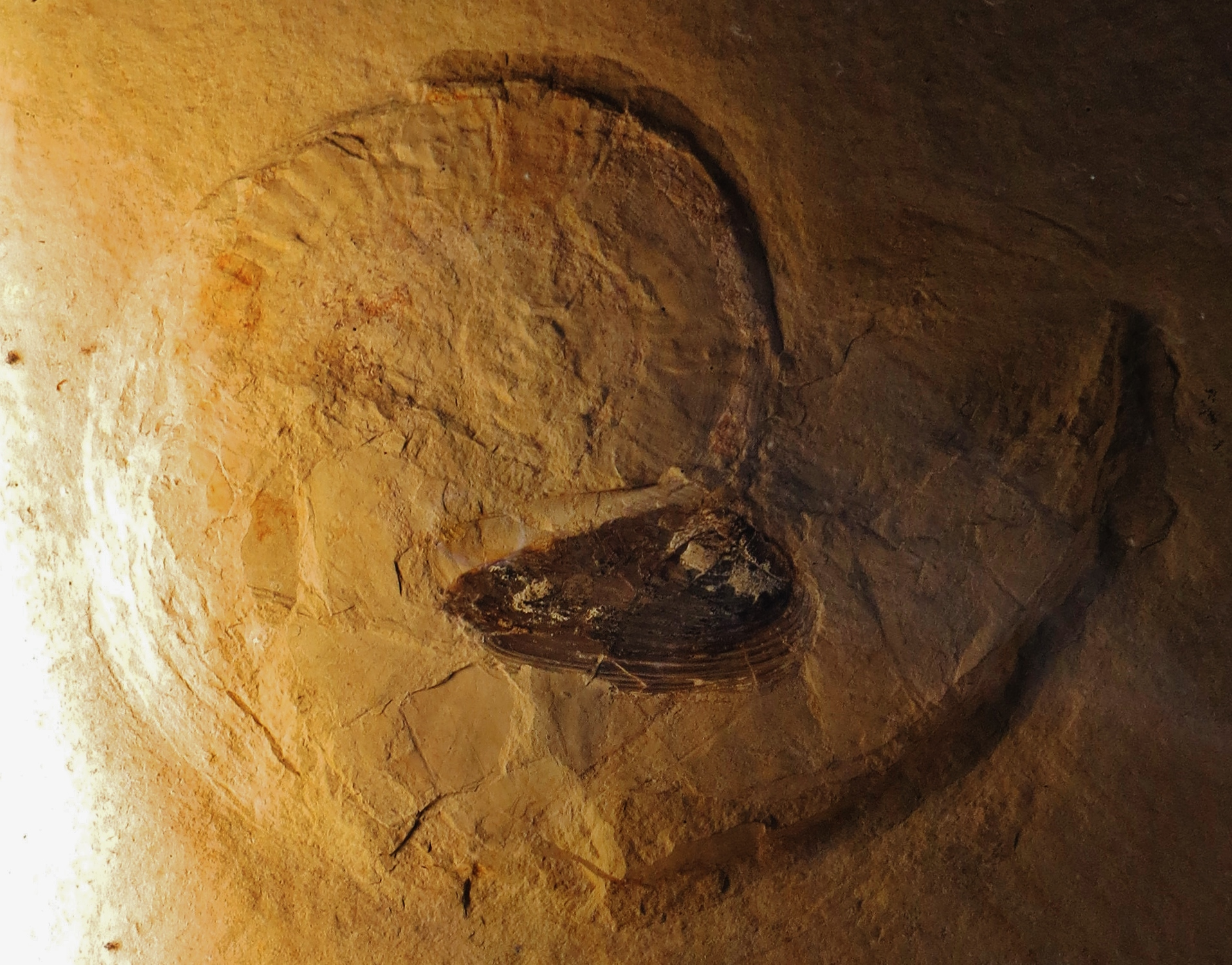 Fossil of Harpoceras - Took the picture at Naturalis, Leiden